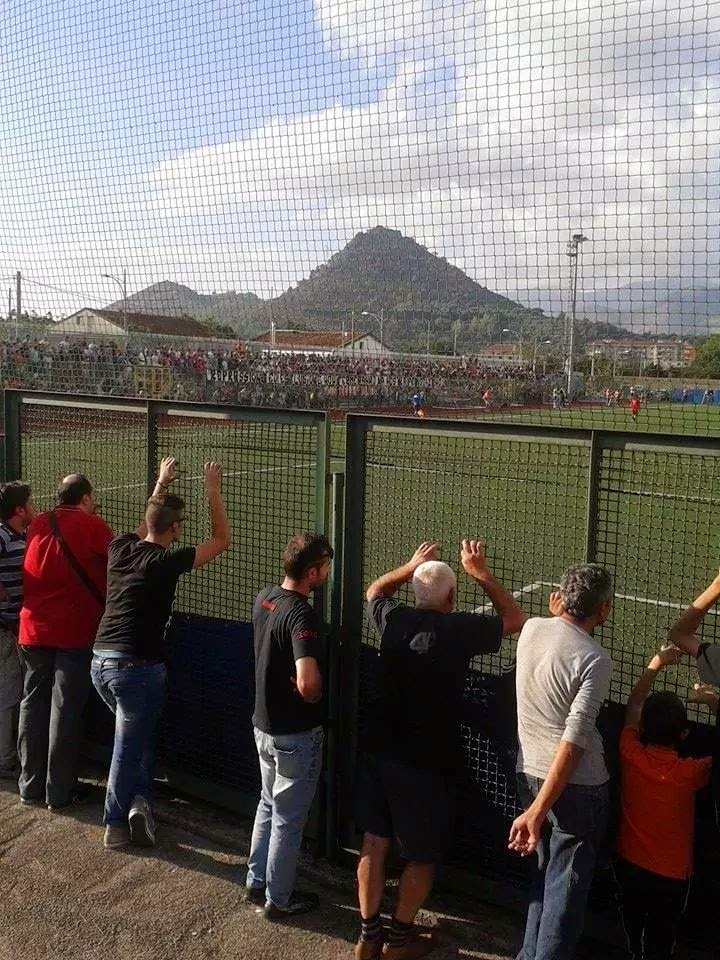 Interno dello stadio Karol Wojtyła di Nocera Superiore, nel 2014